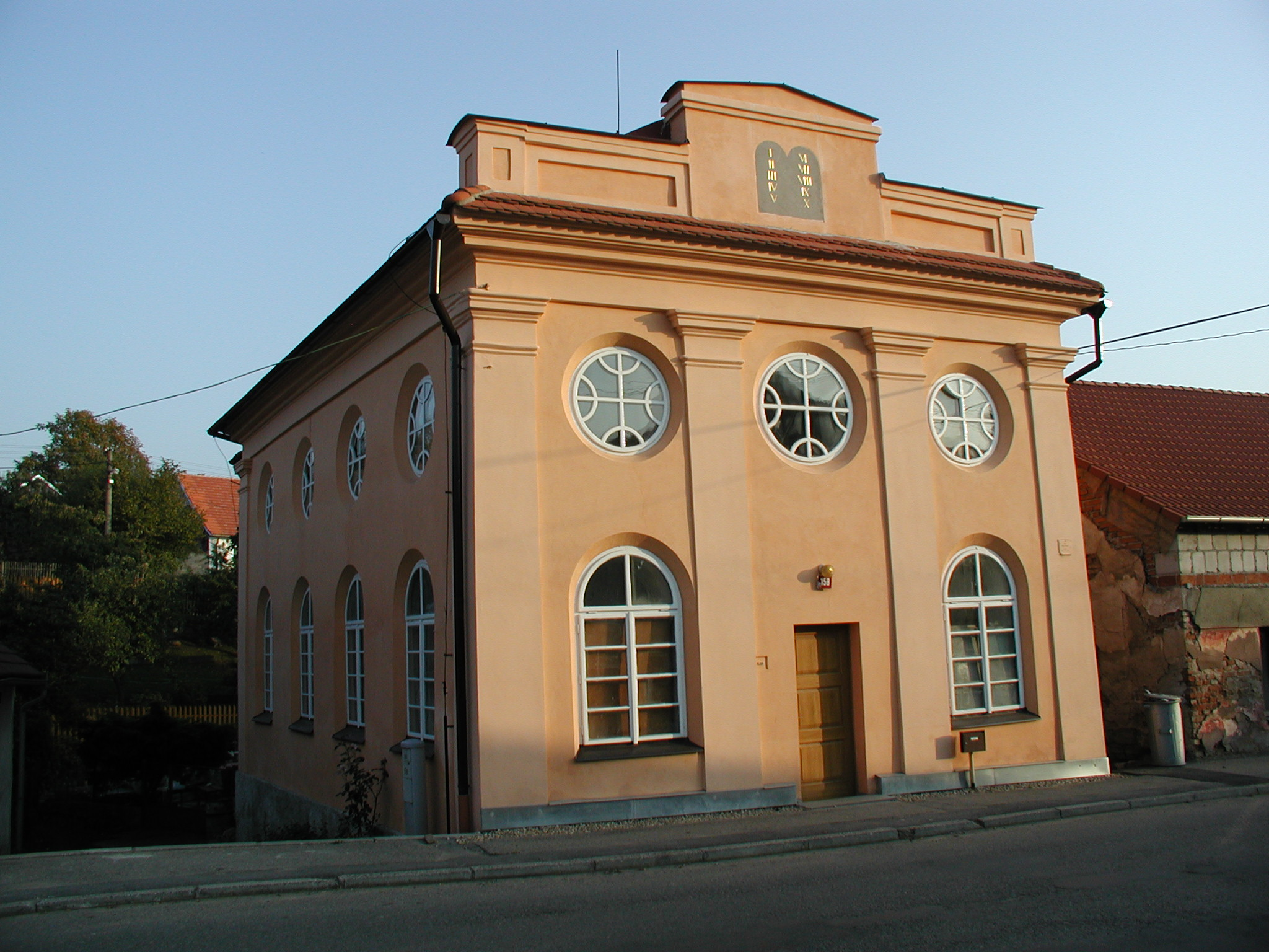 Muzeum života židovské obce - Divišov